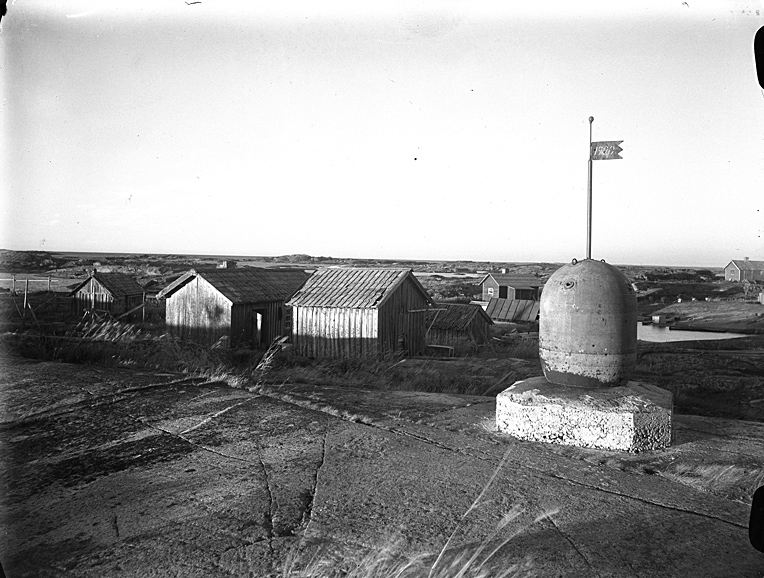 Motiv: Gillöga skärgård Nyckelord: Riksintressen Kategori: Kust- och skärgårdsmiljöGillöga skärgård